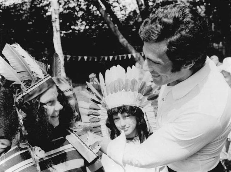 Frankfurt/Oder, 10. Sommerfilmtage, Gojko Mitic ADN-Reiche 25.6.71 FFO [Frankfurt an der Oder]: Sommerfilmtage eröffnet Mit der Uraufführung des DEFA-Films "Anflug Aloha 1" wurden am 25.6.71 die "Sommerfilmtage 71" eröffnet. Zu den Gästen der Veranstaltung gehörte auch Gojko Mitic (r), bekannter Indianer-Darsteller. (Siehe auch ADN-Meldungen) Abgebildete Personen: Mitic, Gojko: Schauspieler, Jugoslawien (PND 118582798)